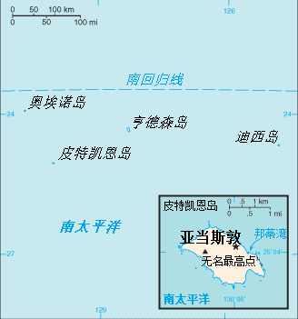 mapo de la Pitkarna Insularo el la Monda Faktlibro de CIA, priskribo en la ĉina